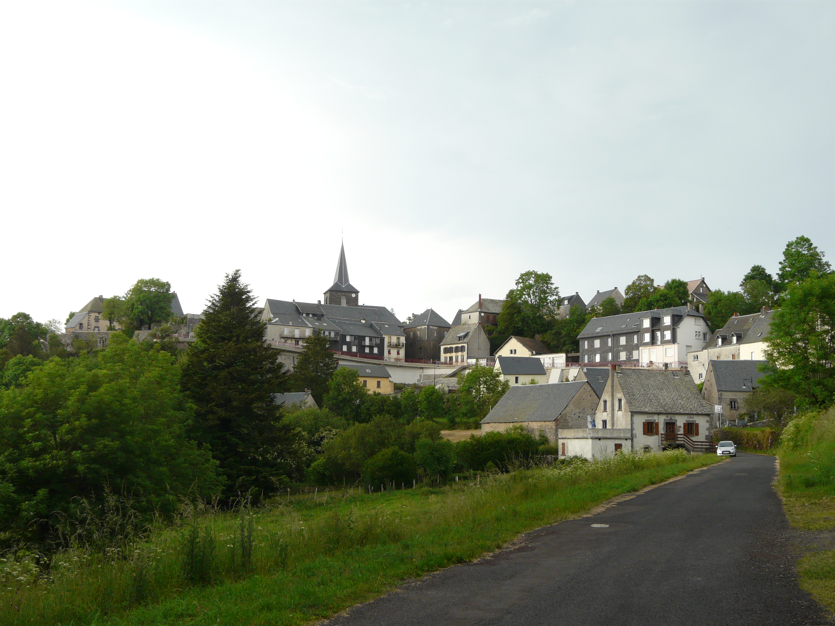 Le village de Laqueuille, Puy-de-Dôme, France.